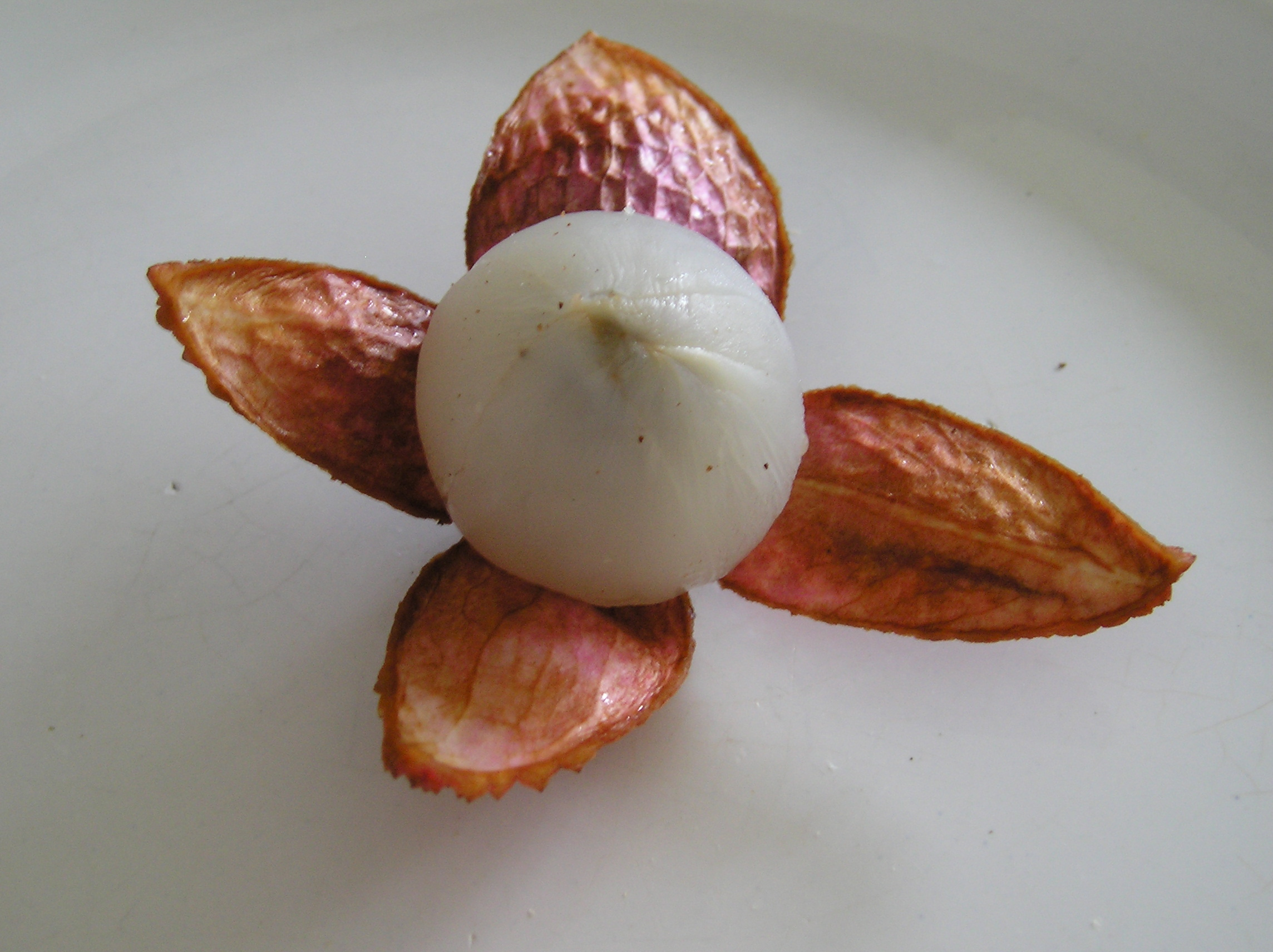 Fruta da Lichia